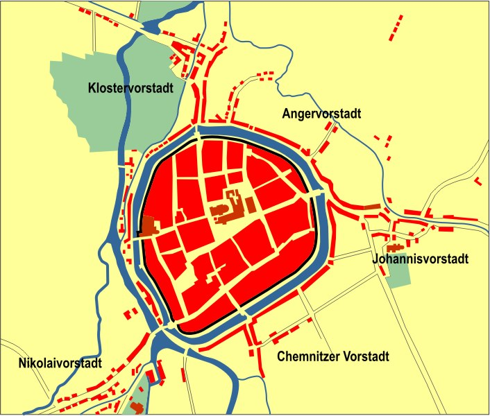 Karte von der Stadt Chemnitz und ihrer Vorstädte (um 1700)